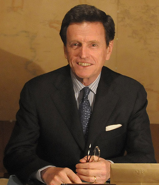 Carlos Anibal Larraín Peña (*18 de noviembre de 1942 - ). Es un abogado y político chileno. Desde 1996 es concejal por la comuna de Las Condes y desde el 2006 es presidente del partido Renovación Nacional. Churchill War Rooms